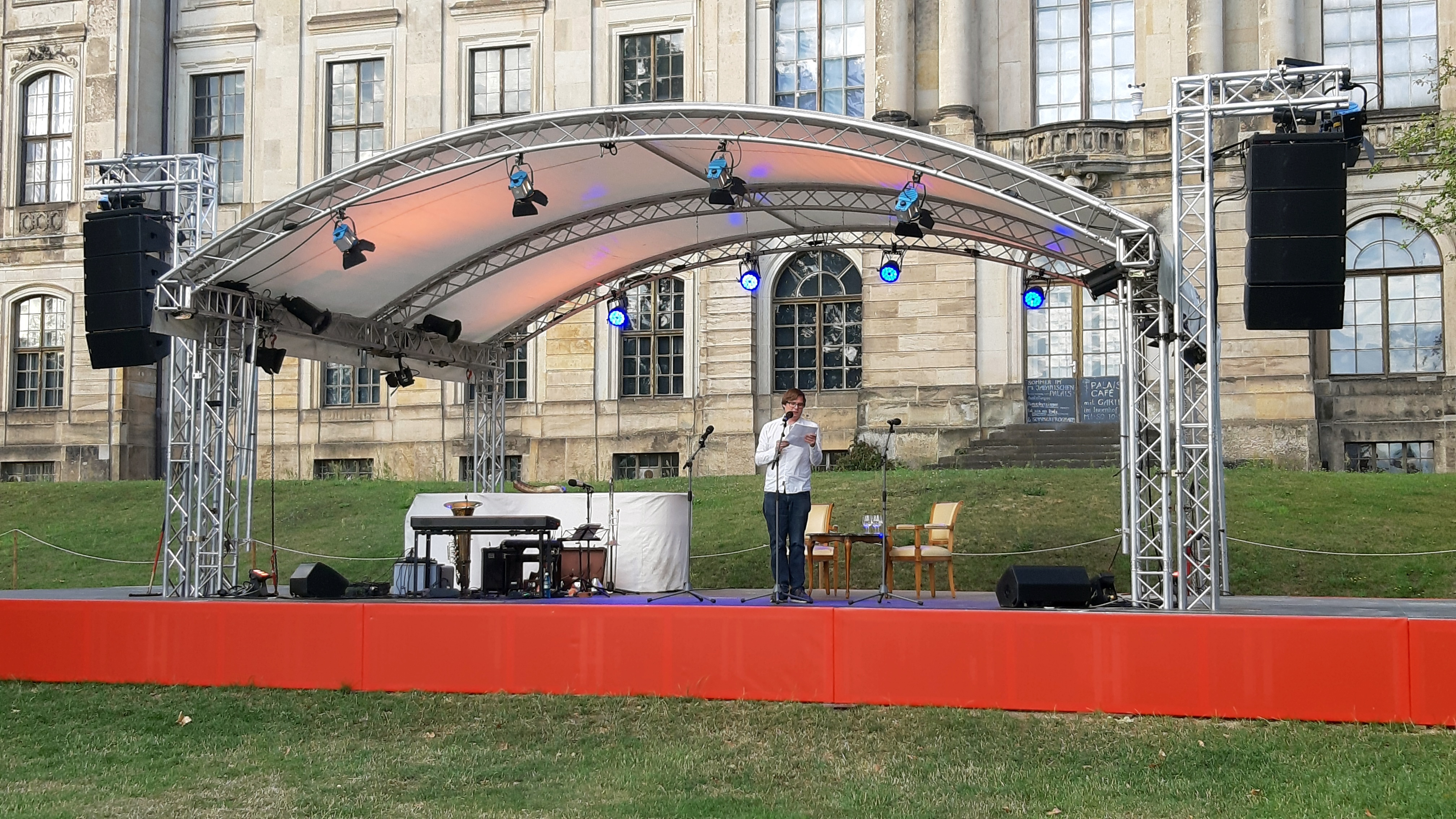 Michael Bittner beim Palais-Sommer in Dresden 2020